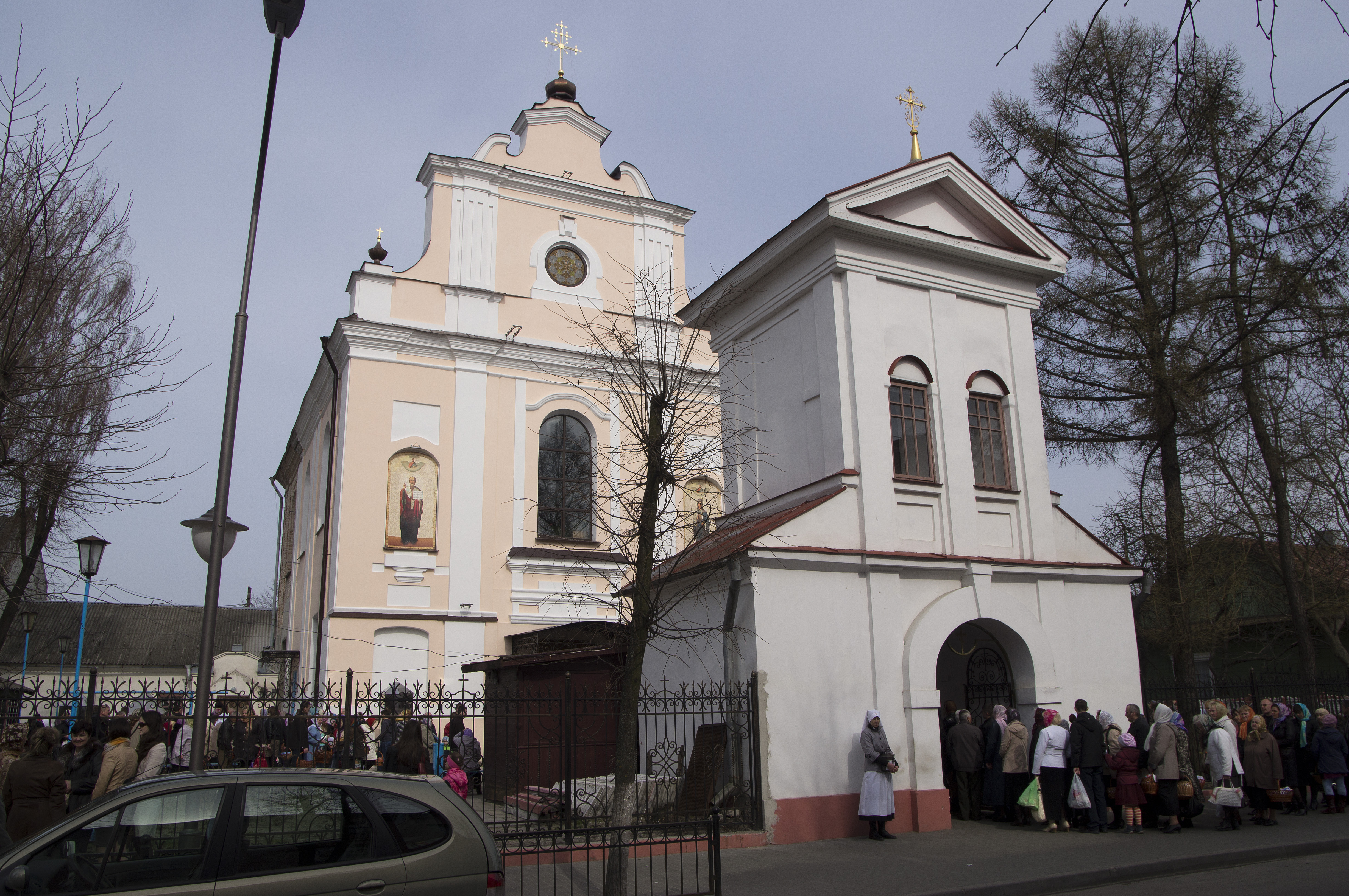 Беларуская (тарашкевіца): Ансамбль былога кляштара бэрнардынцаў:Варварынская царква, роспіс алтарнай часткі, кляштарны корпус, званіца. г. Пінск This is a photo of Belarusian heritage monument. Reference number: 112Г000544 ( WLM)